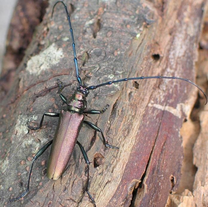 Männlicher Moschusbock (Aromia moschata). Den Käfer habe ich auf einer Weide in Eckernförde entdeckt, die bereits sehr "zerfressen" ist. Beim männlichen Moschusbock sind die Fühler länger als der Körper. Beim weiblichen Moschusbock sind sie kürzer als der Körper.